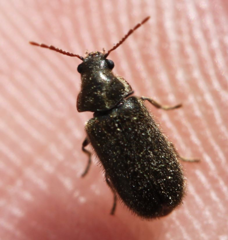 Xestobium plumbeum am 24.4.2017 südlich von Mannheim